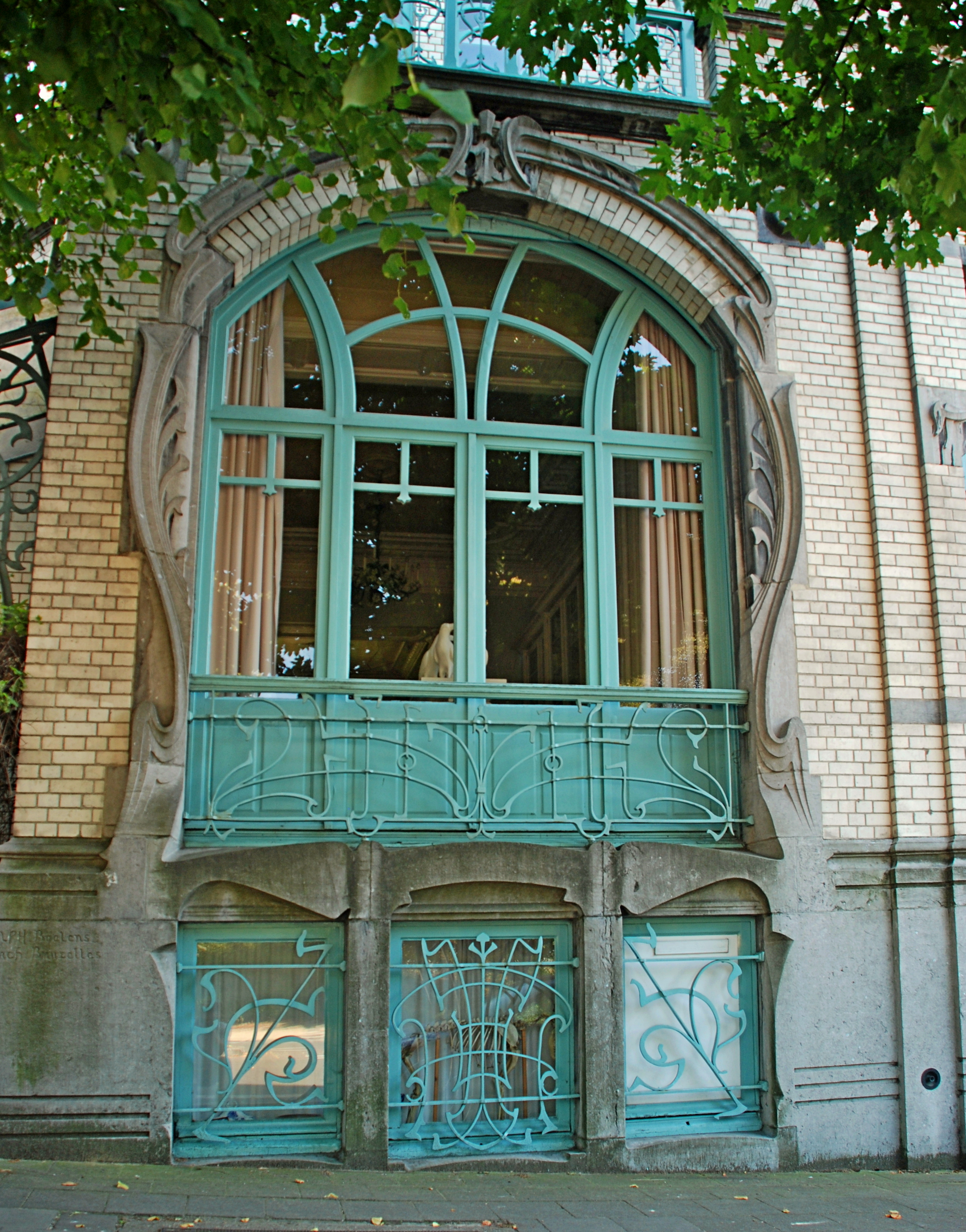 Belgique - Bruxelles - Avenue Besme 103 (Art nouveau, architecte Alphonse Boelens, 1903)